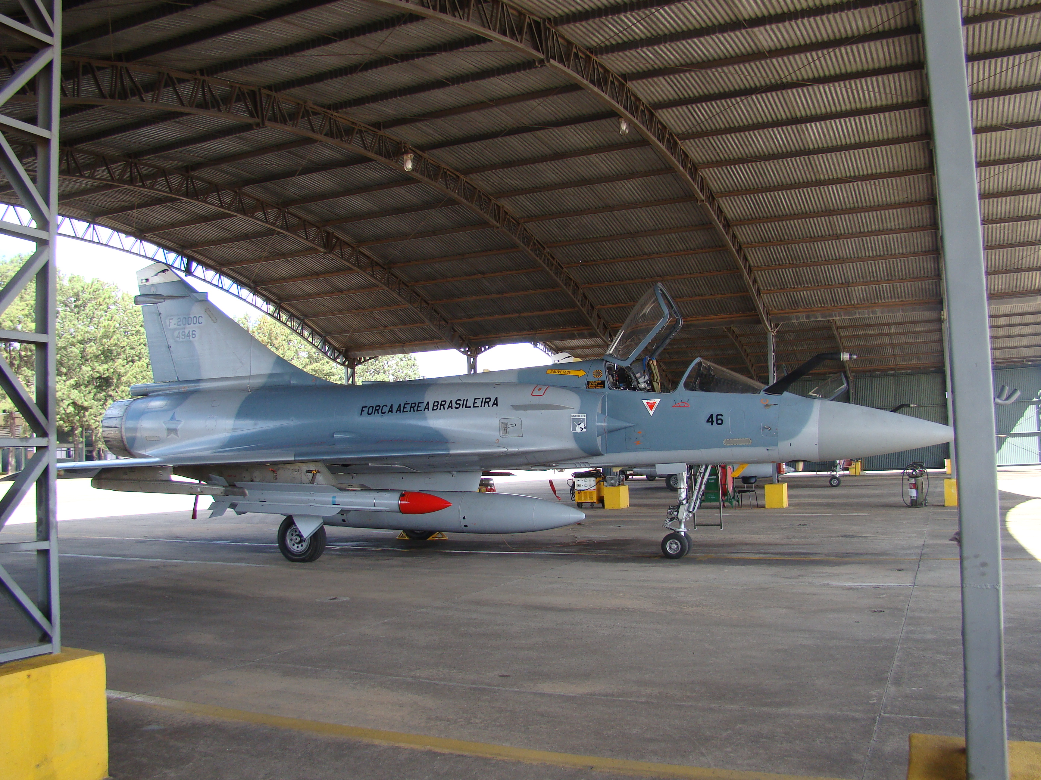 Lei do Direito Autoral nº 9.610, de 19 de Fevereiro de 1998: proibe a reprodução ou divulgação com fins comerciais ou não, em qualquer meio de comunicação, inclusive na Internet, sem prévia consulta e aprovação do autor. Reproduction prohibited. © All rights reserved. Image protected by the Brazilian Copyright Law No. 9610 19/02/1998 Contato